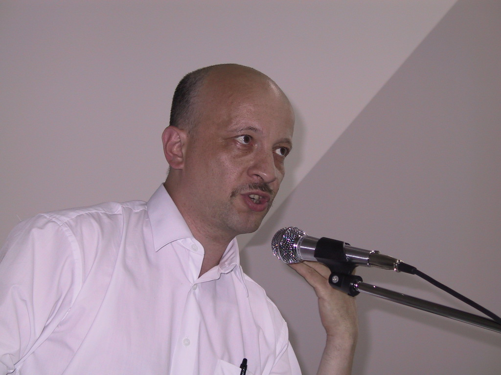 Анатолий Гин выступает на съезде Международной Ассоциации ТРИЗ, Петрозаводск, 2003 г.